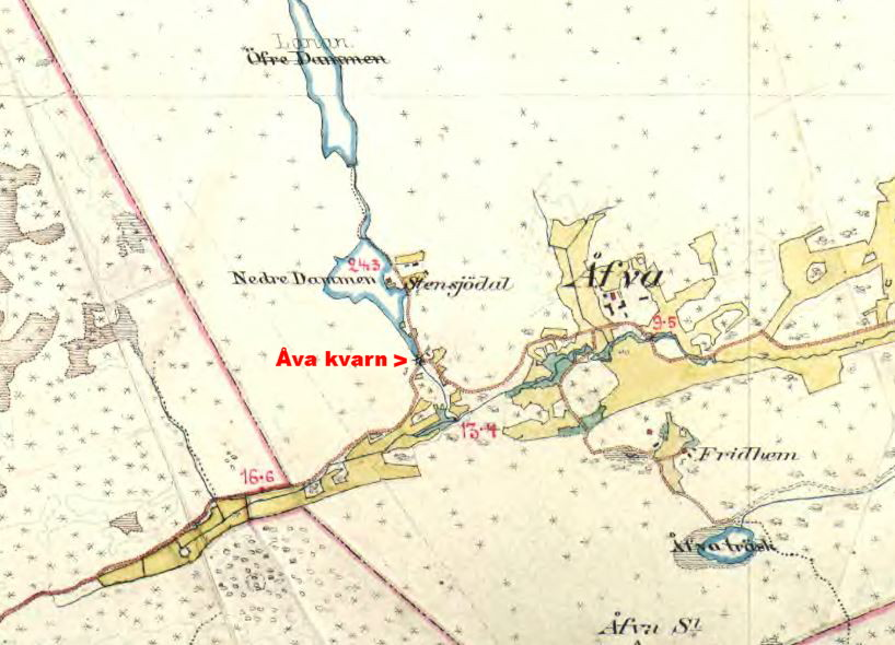 Del av Häradsekonomiska kartan visande Lanan (tidigare Övre Dammen) och Nedre Dammen